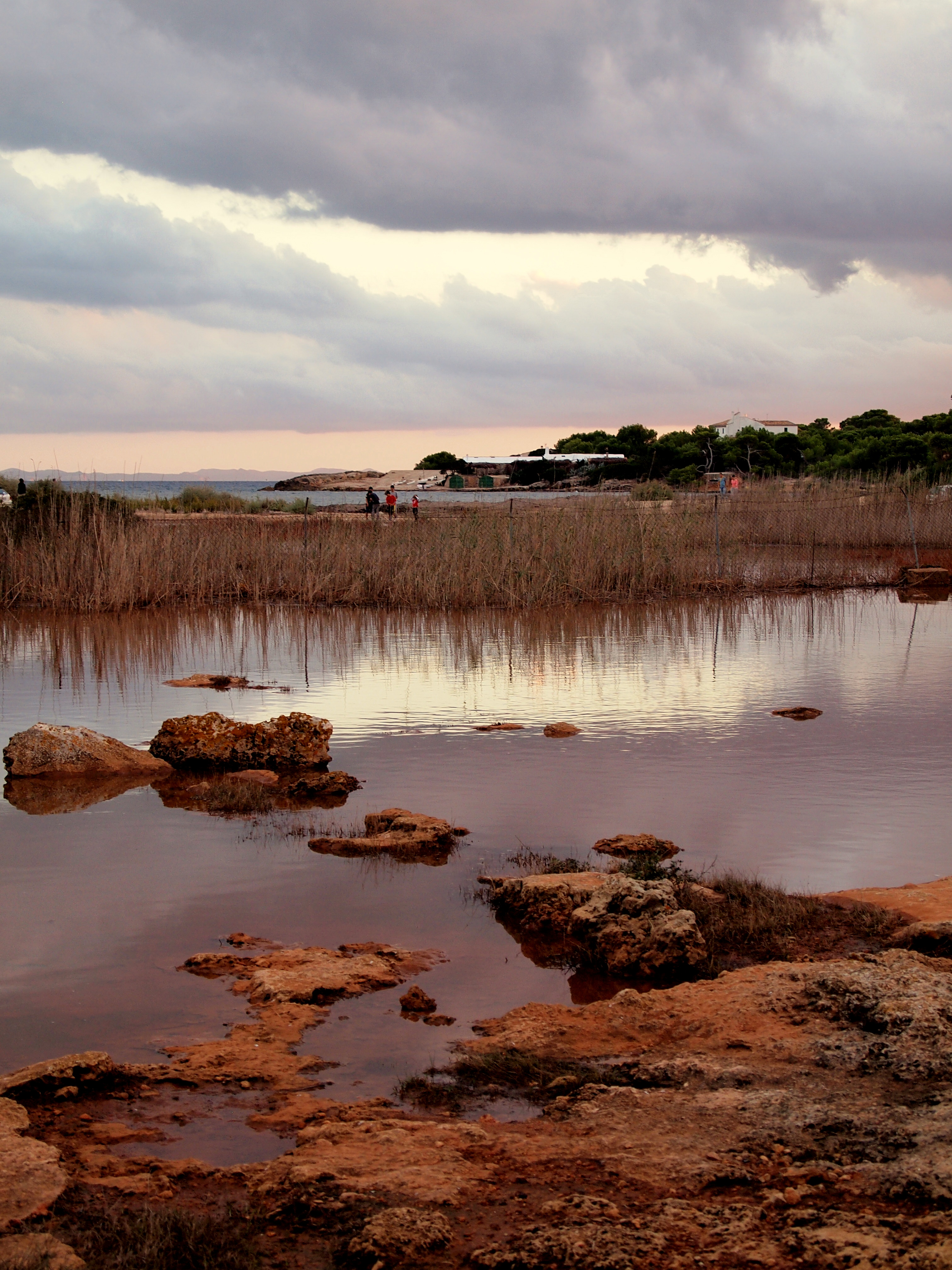 Estanyol de Garonda, prop de s'Estanyol de Migjorn, a la costa del municipi de llucmajor, Mallorca.